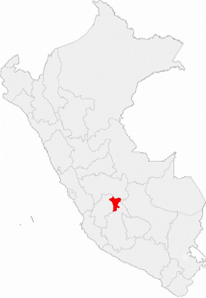 Localizacion de Huanta en Peru